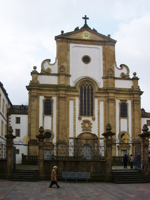 Paderborn: Katholische Marktkirche Sankt Franz Xaver; ehemalige Jesuitenkirche, Gymnasial- und Universitätskirche